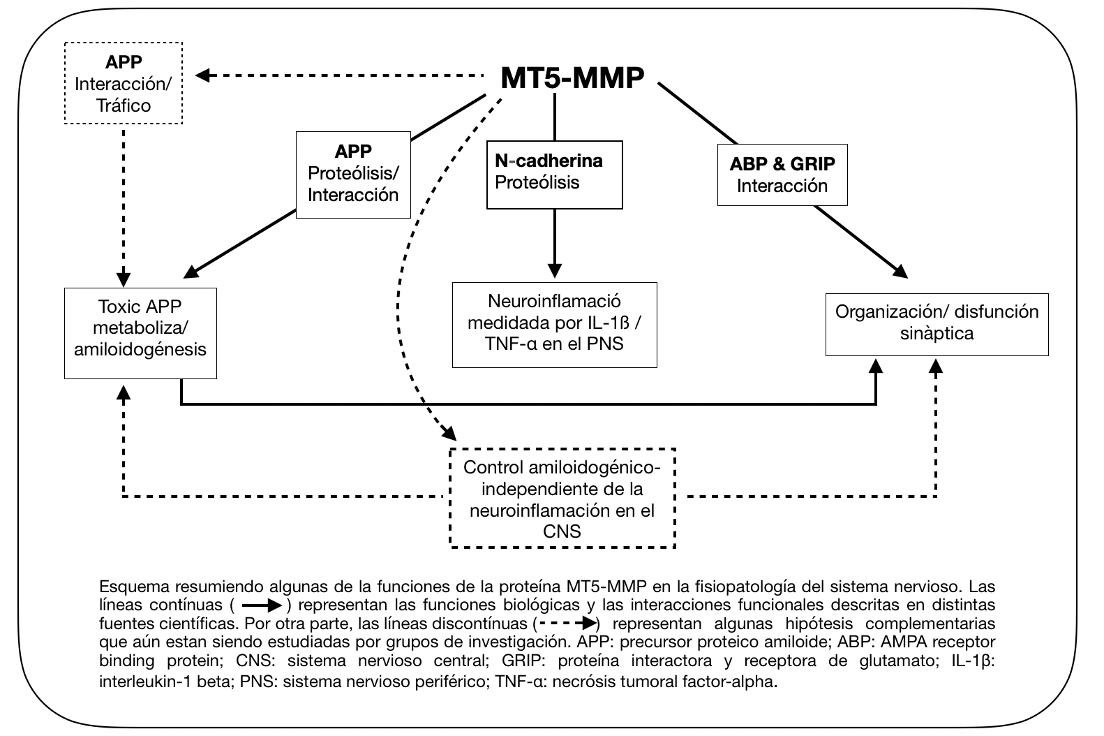 Esquema de las principales funciones conocidas y en estudio de la proteína MT5-MMP en el sistema nervioso fisiopatológico.